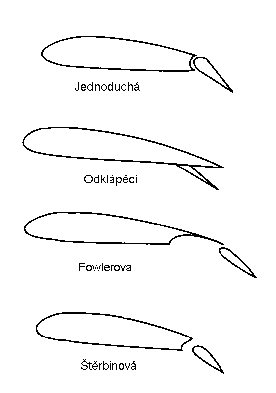 Druhy vztlakových klapek letadel